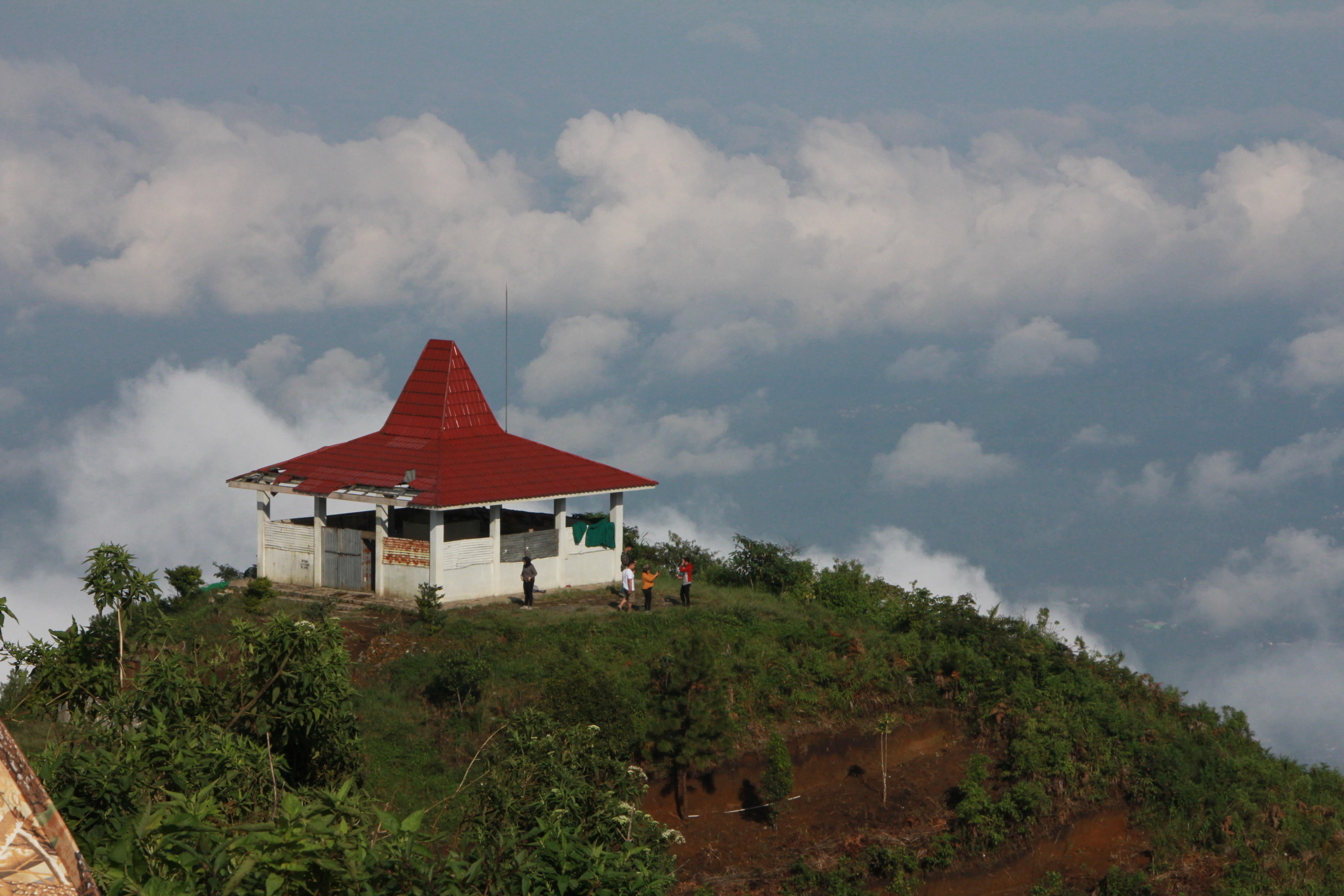 Basa Jawa: Makam kasebut papane ana ing ndhuwur Gunung Andong.